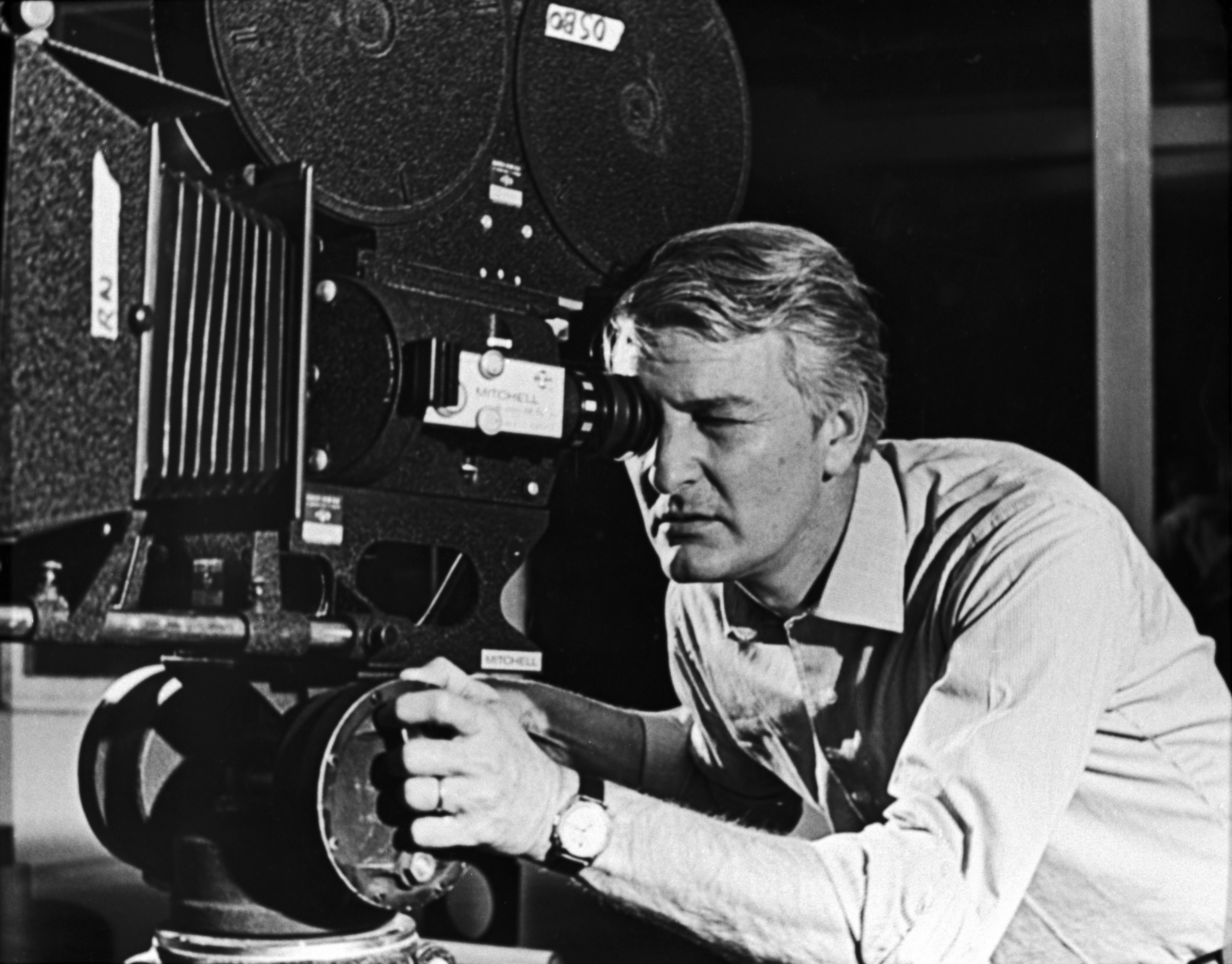 Alberto Isaac 01